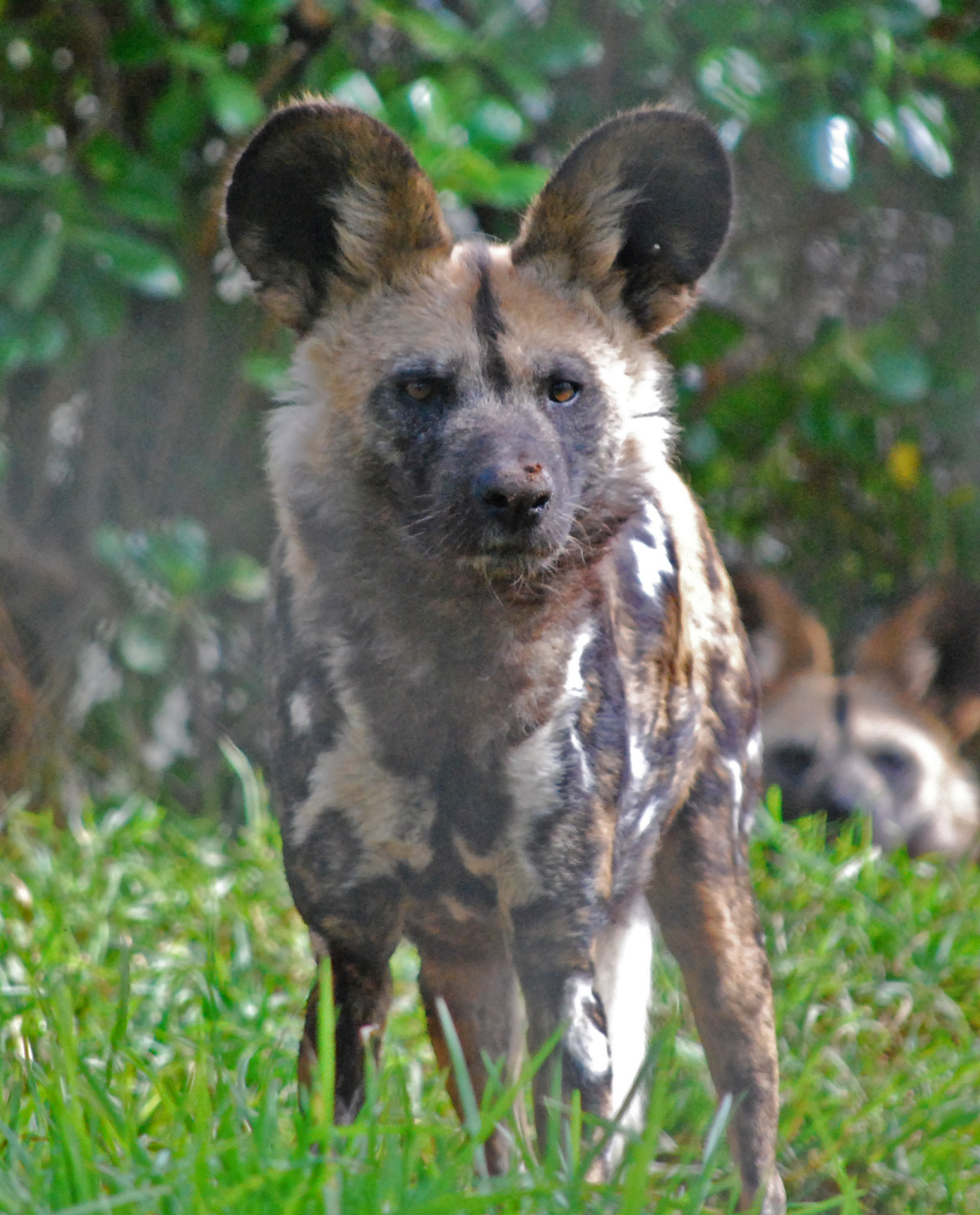 Adelaide Zoo